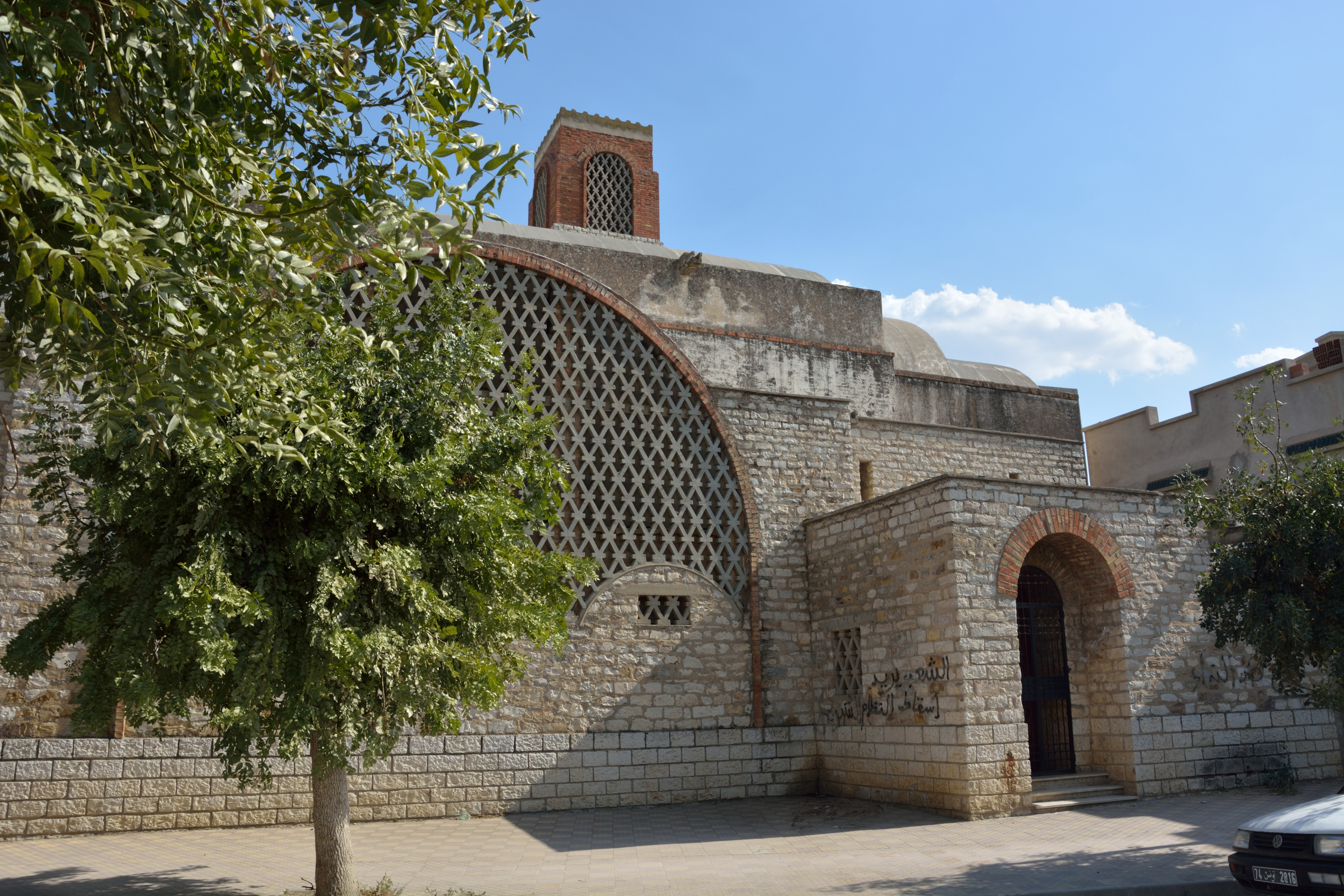 Siège de la bibliothèque publique de Tebourba (ancienne église), Tebourba